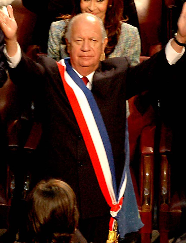 El saliente presidente chileno Ricardo Lagos junto a mandatarios y autoridades de otros países. Chile, Santiago de Chile.